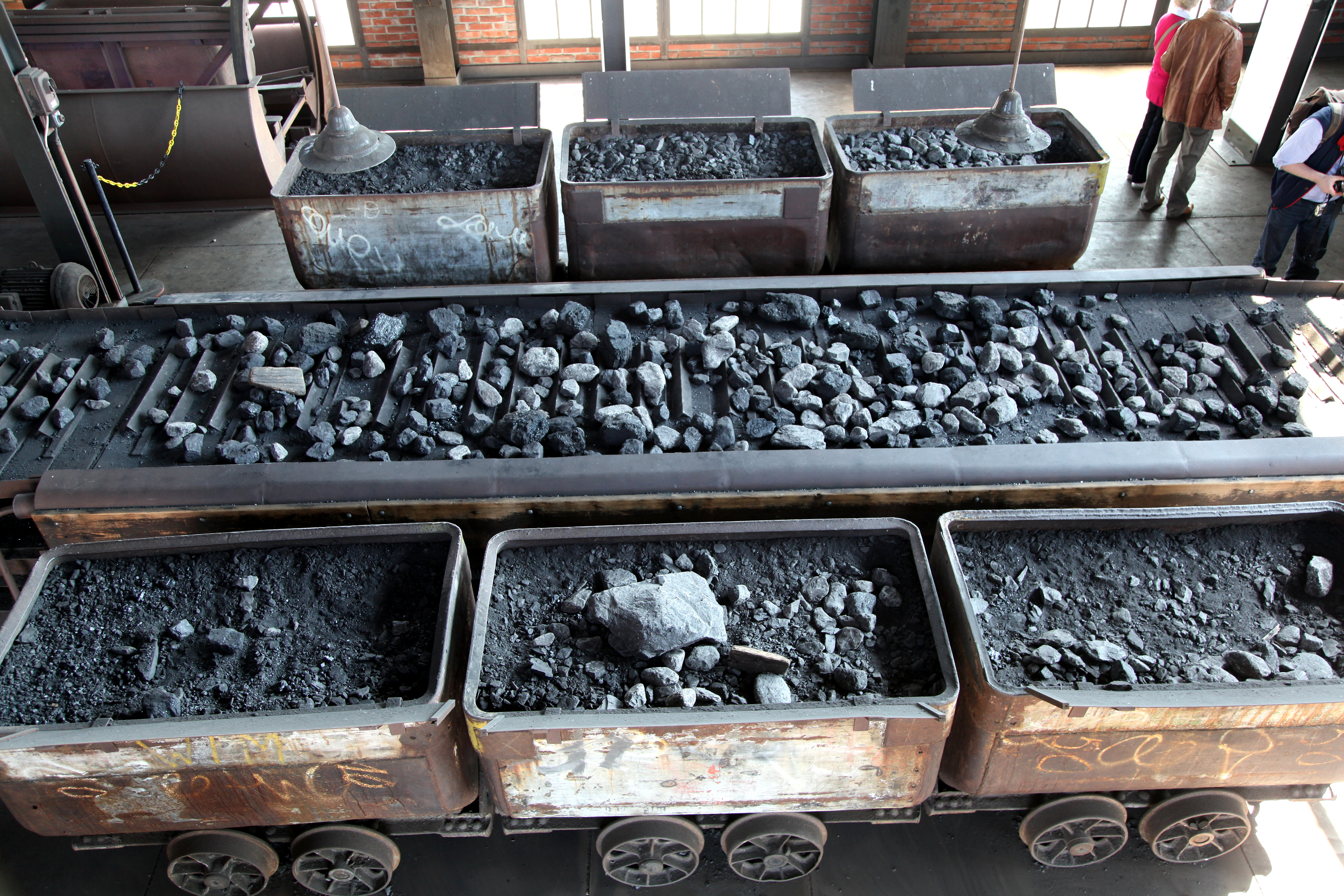 Im Kohleverladungsgebäude an Schacht 2 der Zeche Zollern 2/4 in Dortmund